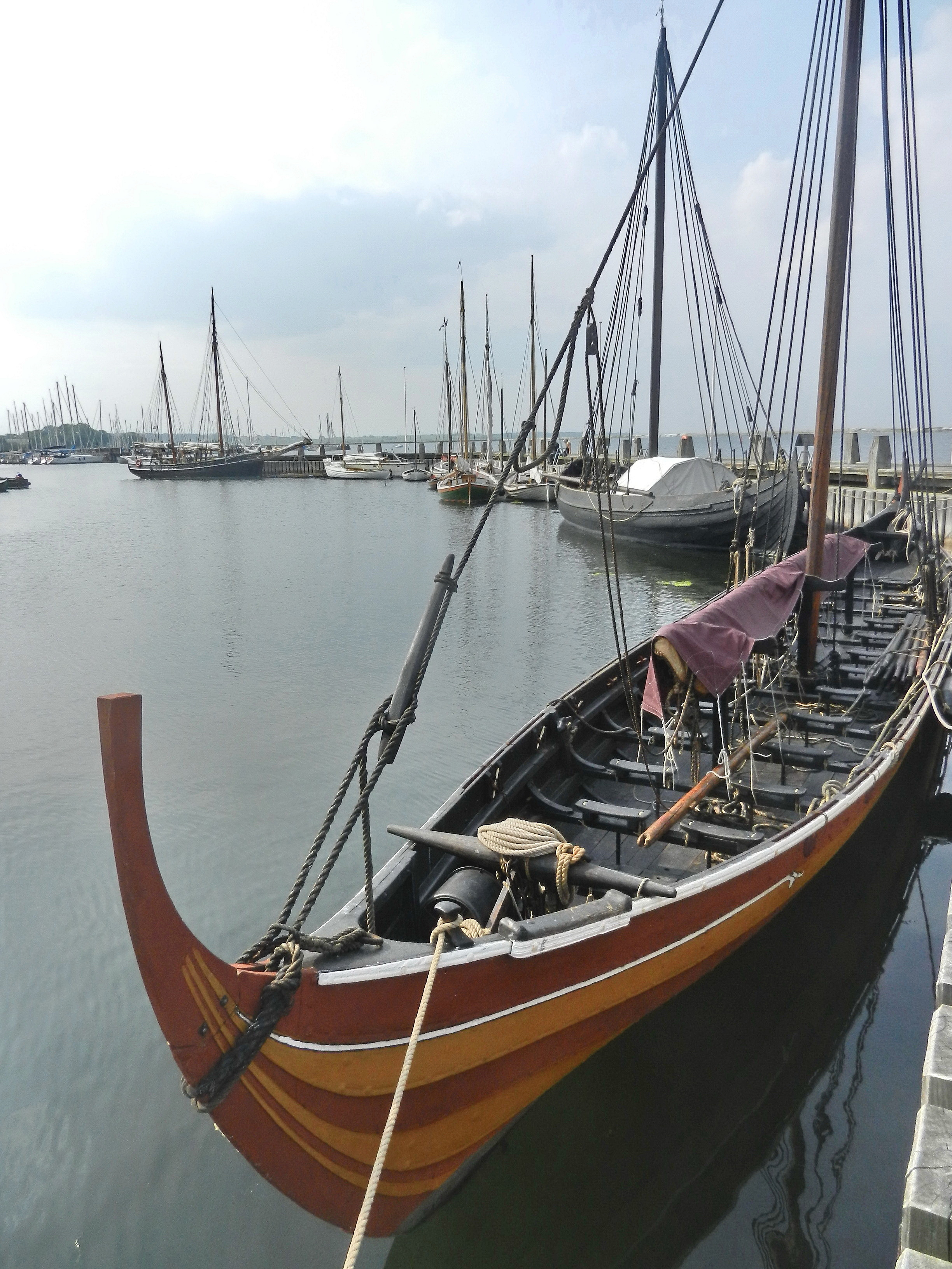 Roskilde Viking Ship Museum